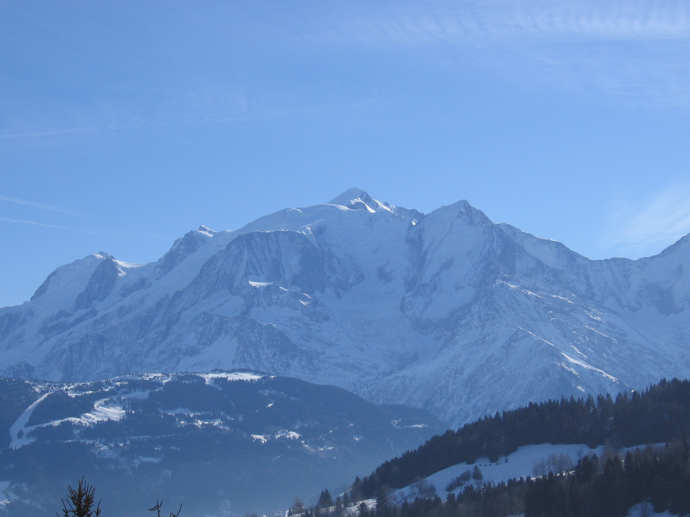 Mont Blanc vu de Cordon